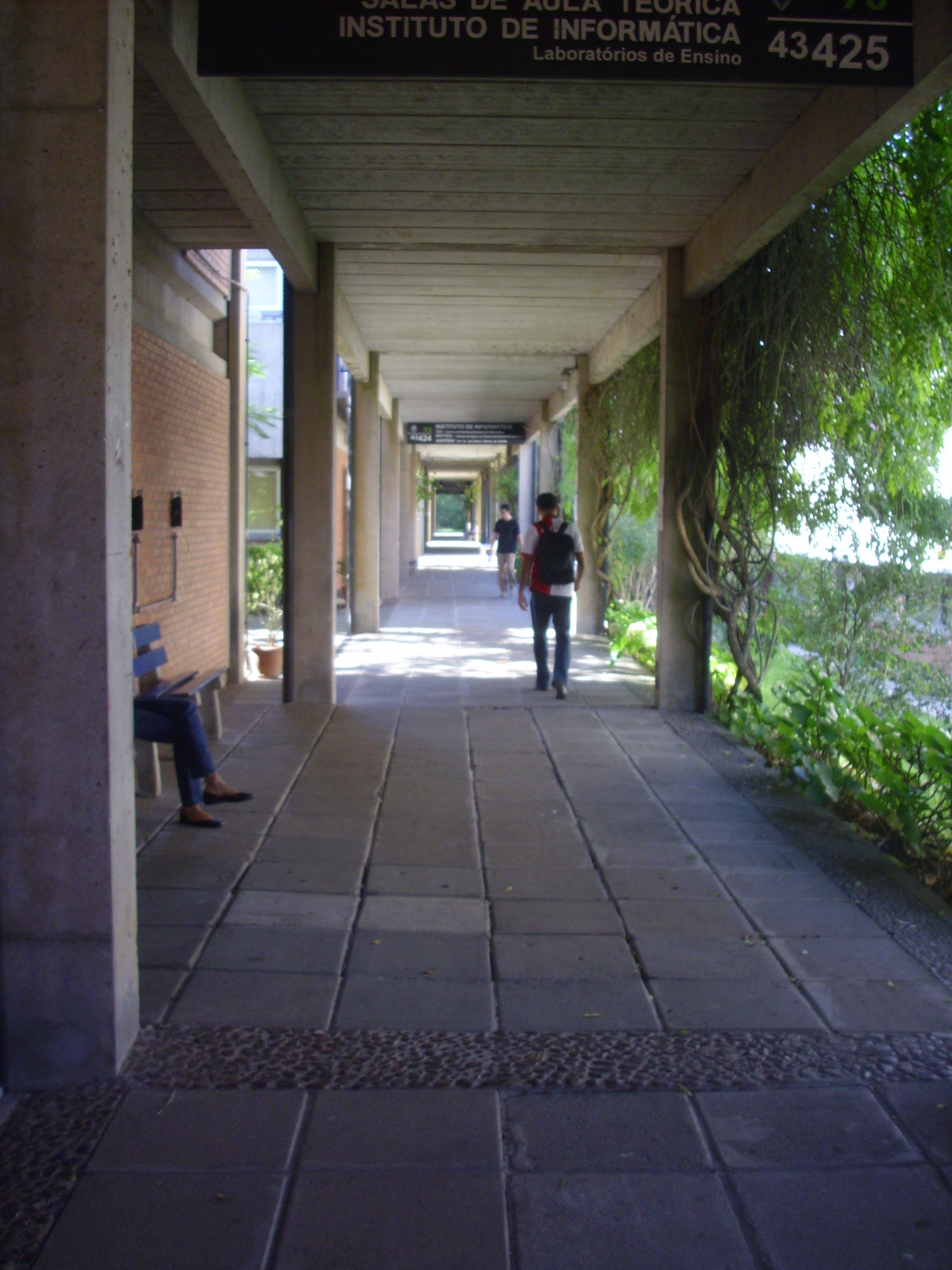 Instituto de Informática da UFRGS.